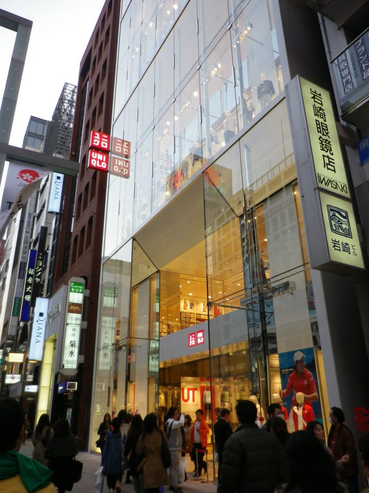 ユニクロ銀座店（グローバル旗艦店）